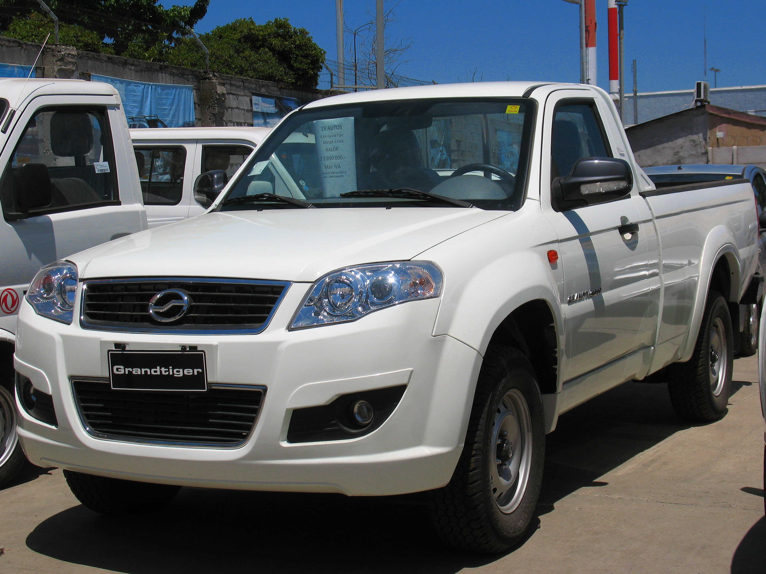 ZX Auto Grandtiger 2.2 2014